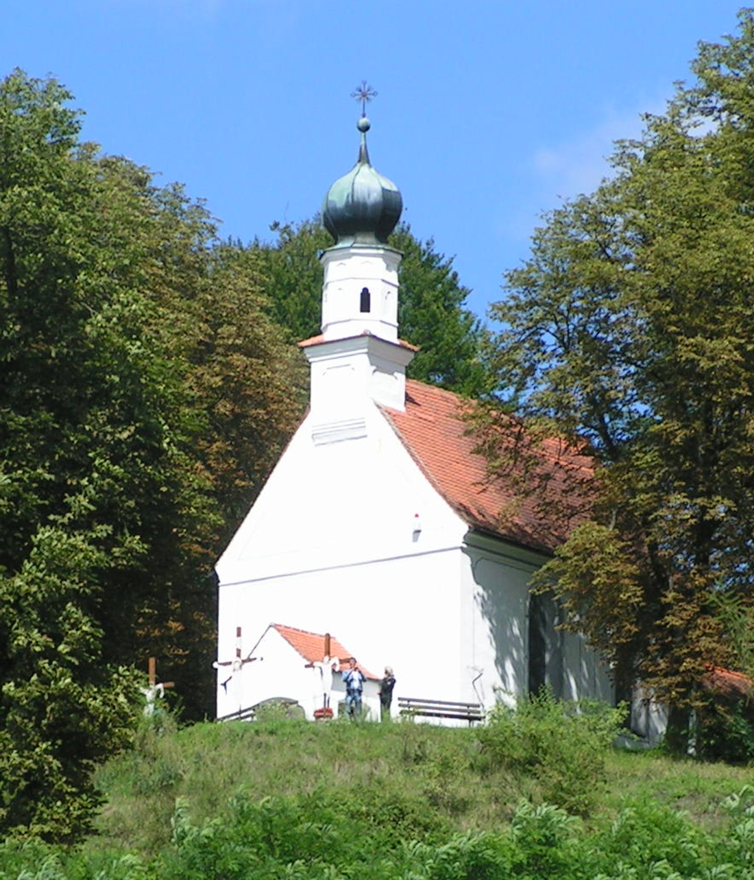 Rottenegg (Geisenfeld), Landkreis Pfaffenhofen, Oberbayern: Die zur Erinnerung an die Burg Rotteneck errichtete Bergkirche